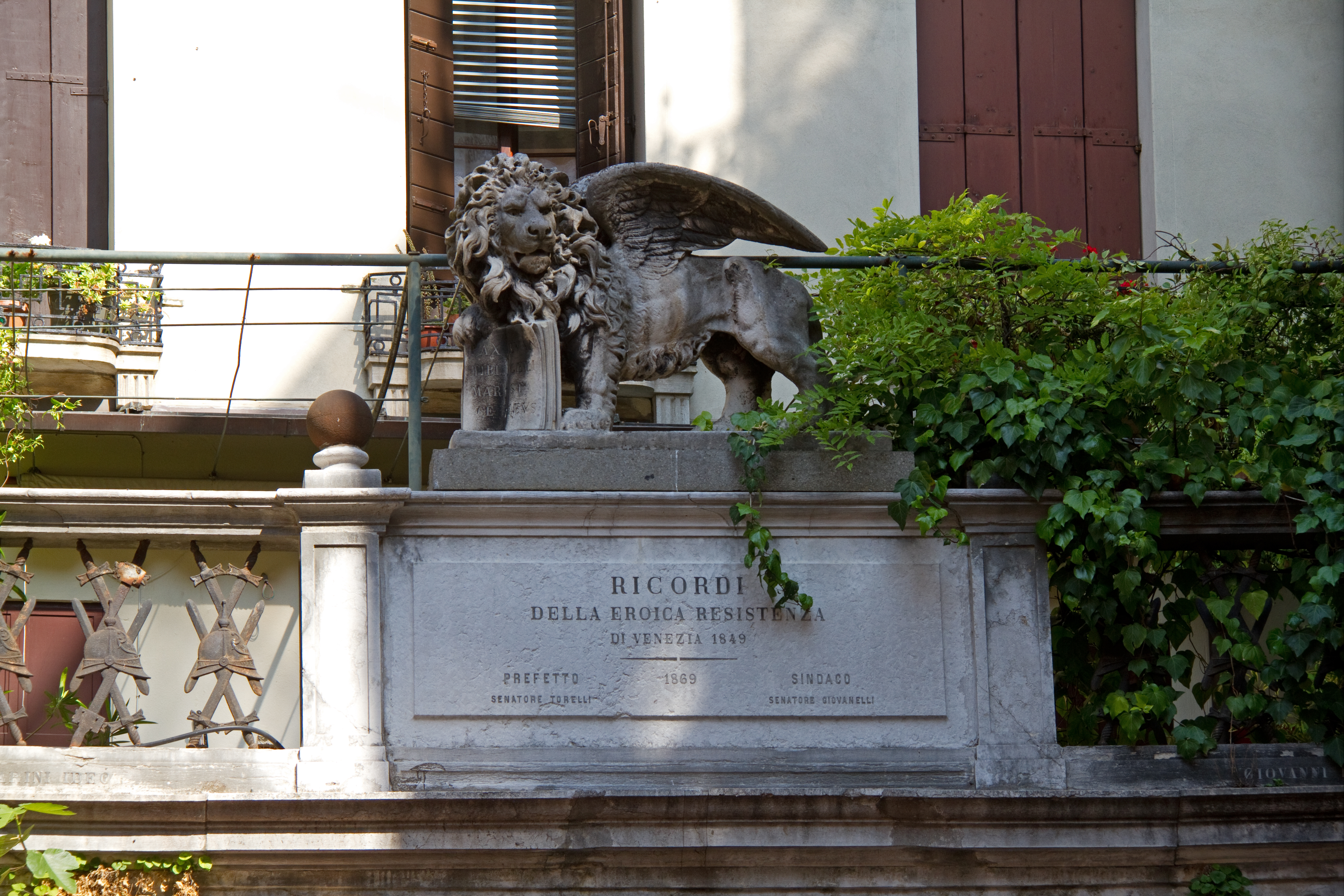 Venice 3